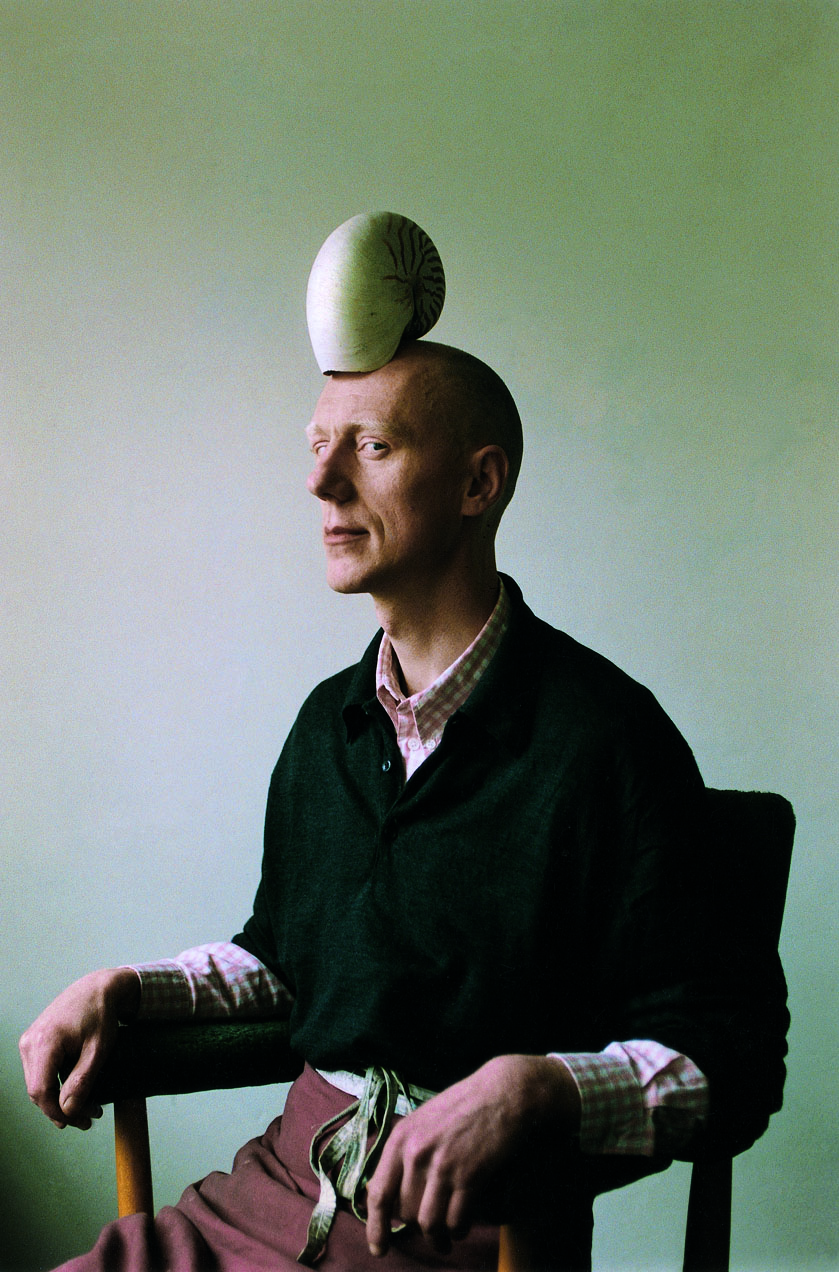 Striptekenaar Herr Seele